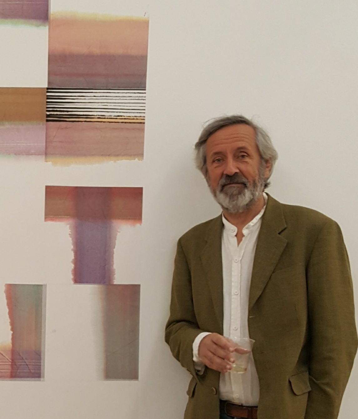 Foto ritraente Roberto Caracciolo